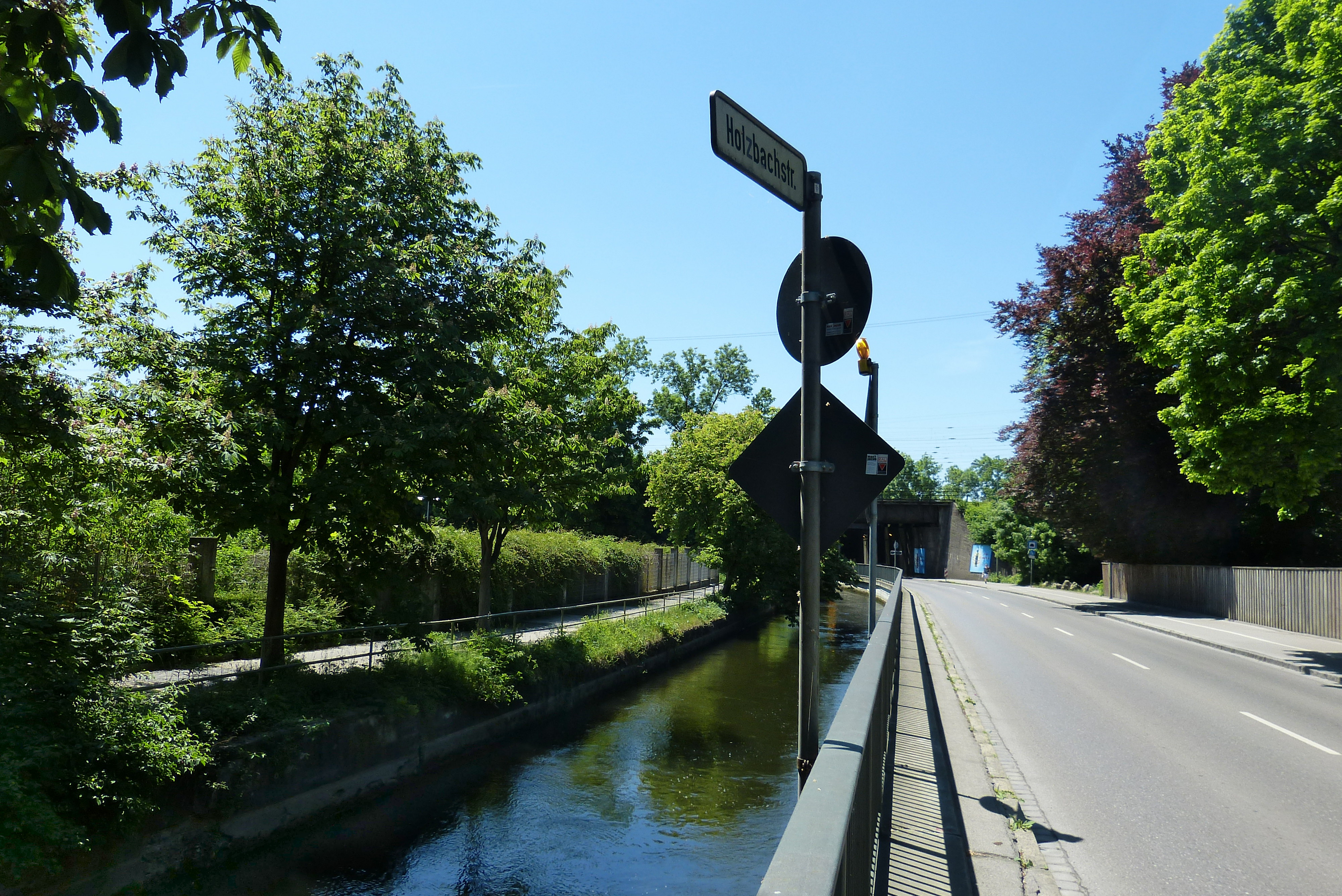 Der Kanal "Holzbach" an der Holzbachstraße in Augsburg, gegenüber der Schwimmschulstraße